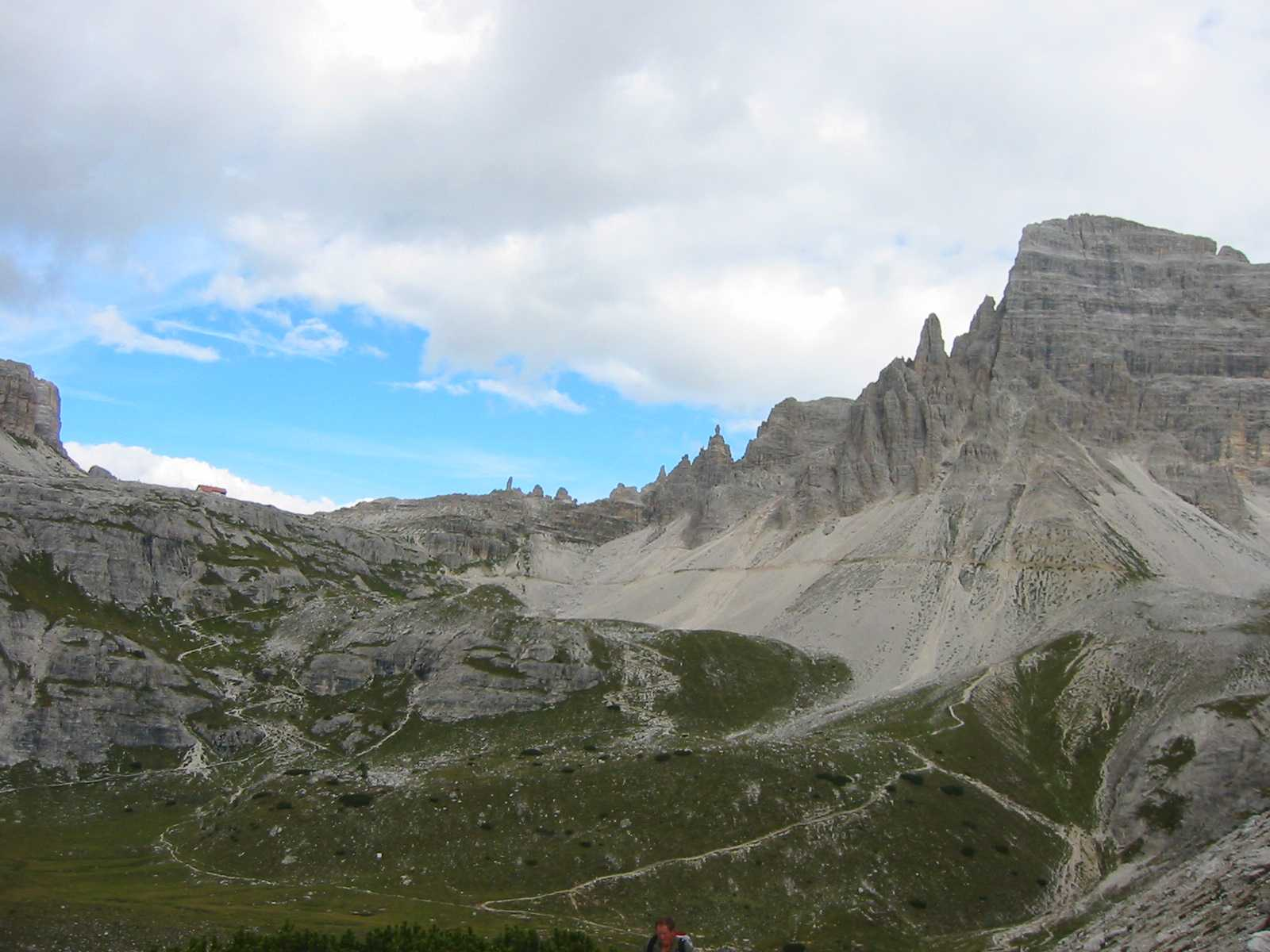 Umgebung der Dreizinnenhütte, fotografiert im September 2004 von Fantasy :-)